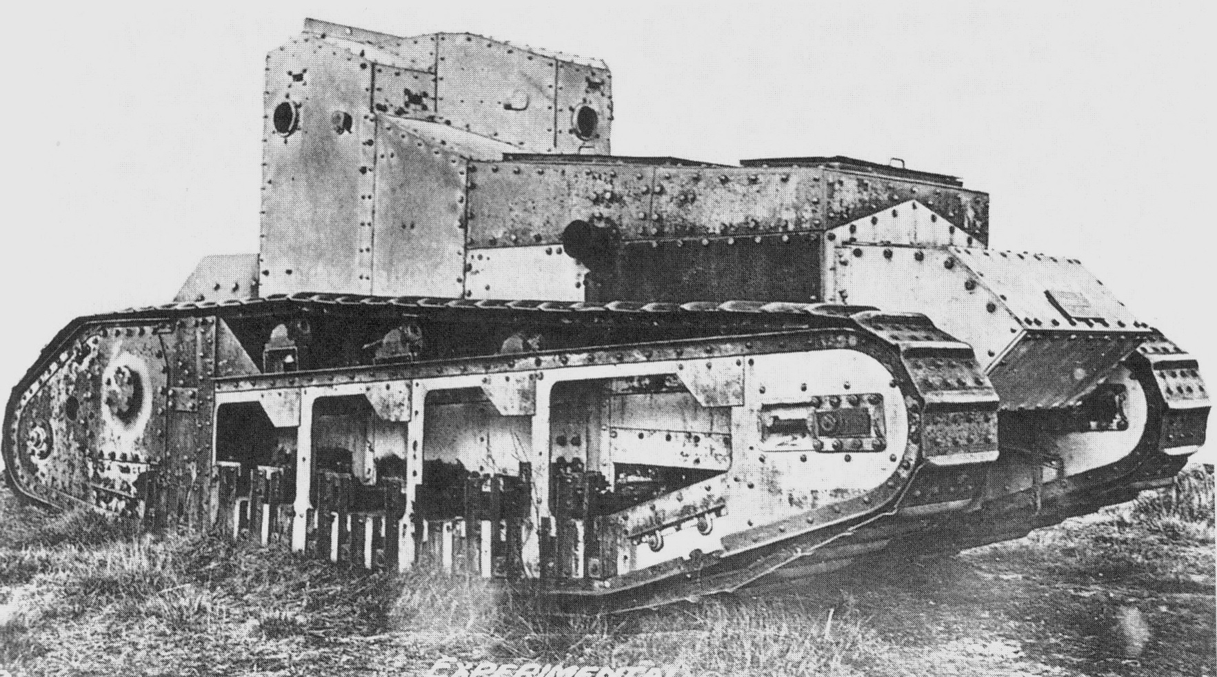 Digitale reproductie foto modificatie Medium Mark A tank